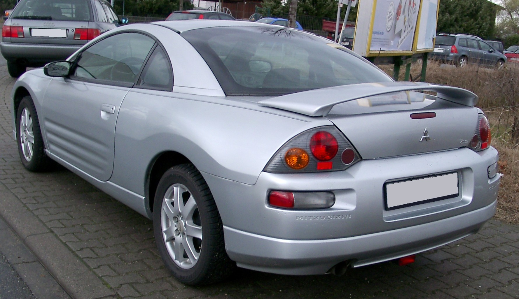 Mitsubishi Eclipse, 3. Generation